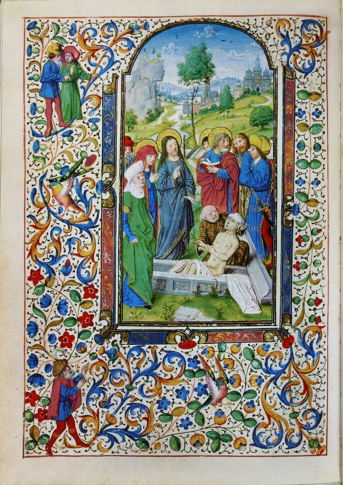 Wien, Österreichische Nationalbibliothek, cod. 1857, Stundenbuch der Maria von Burgund. In: Franz Unterkirchner (Hrsg.): Das Stundenbuch der Maria von Burgund. Codex Vindobonensis 1857 der Österreichischen Nationalbibliothek (Glanzlichter der Buchkunst), Darmstadt 1993.